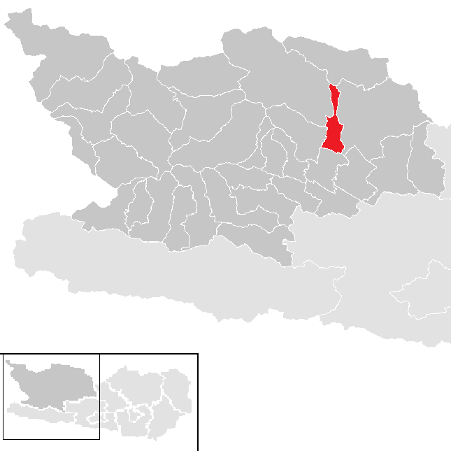 Bezirk Spittal an der Drau